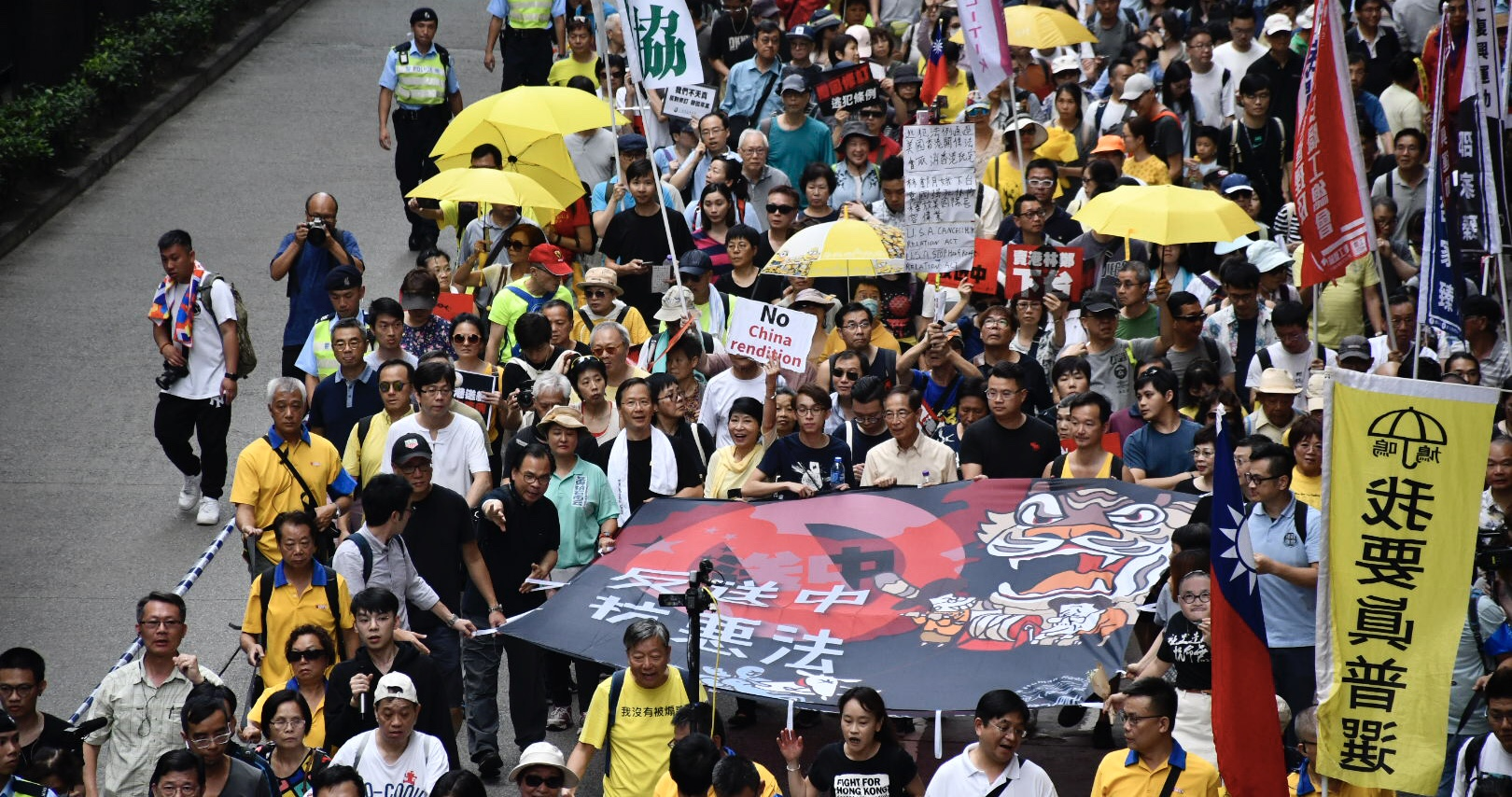 香港民陣宣布超過13萬人參與4-28”反送中”大遊行 (攝影：美國之音湯惠芸）